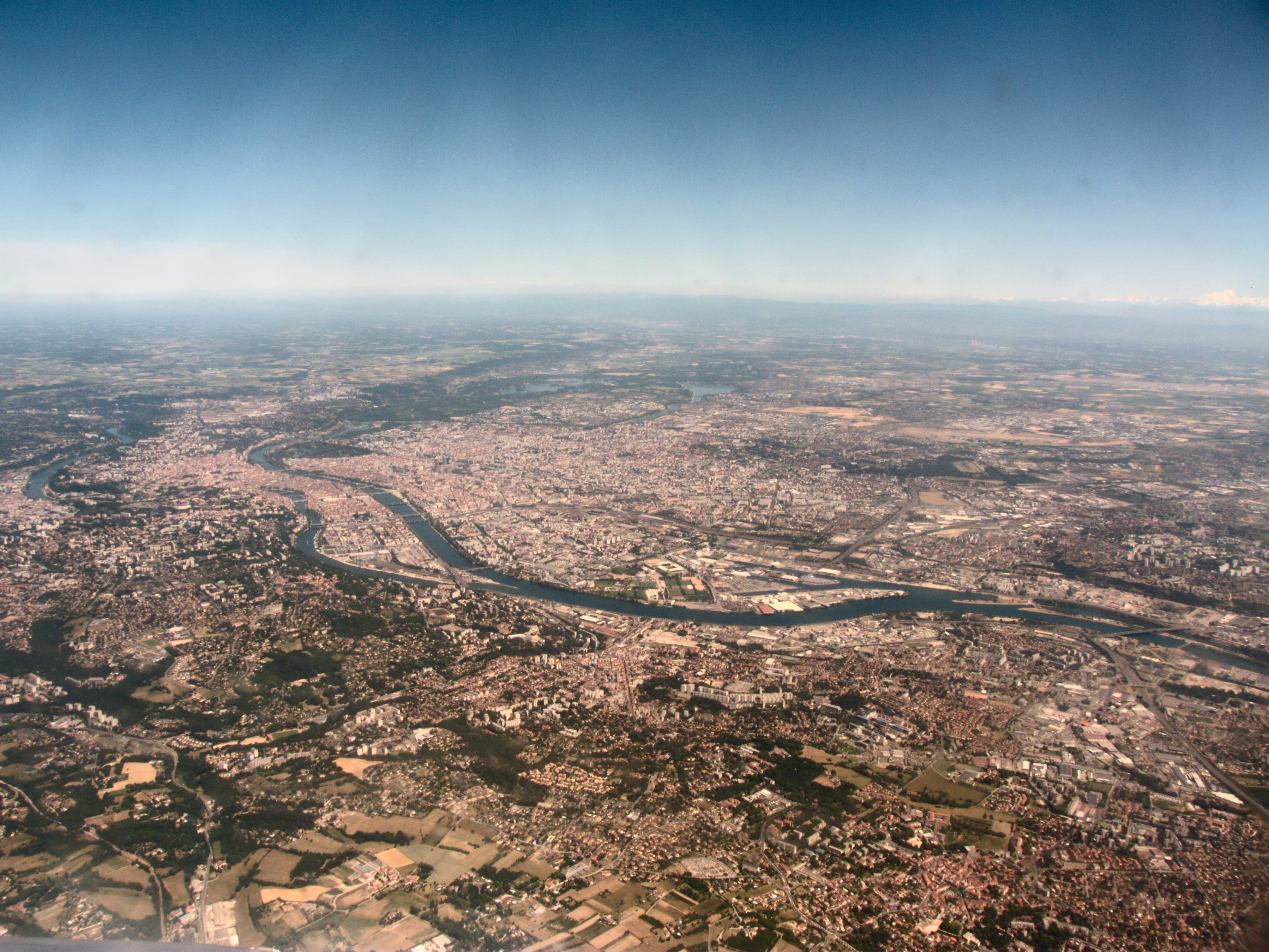 Lyon, France